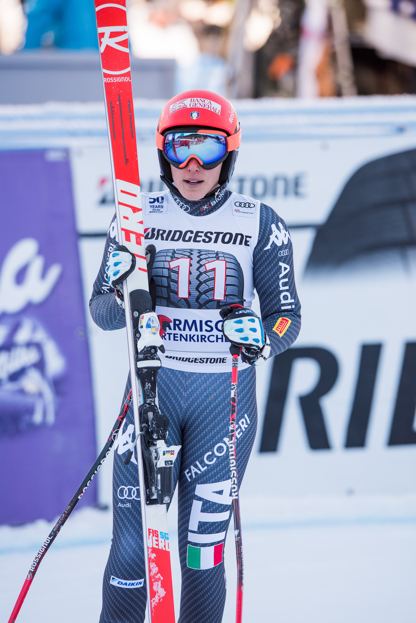 64. Kandahar Rennen,Audi FIS Ski Weltcup Garmisch-Partenkirchen,Damen Super-G,Federica Brignone,Kandahar,Ladies Super-G